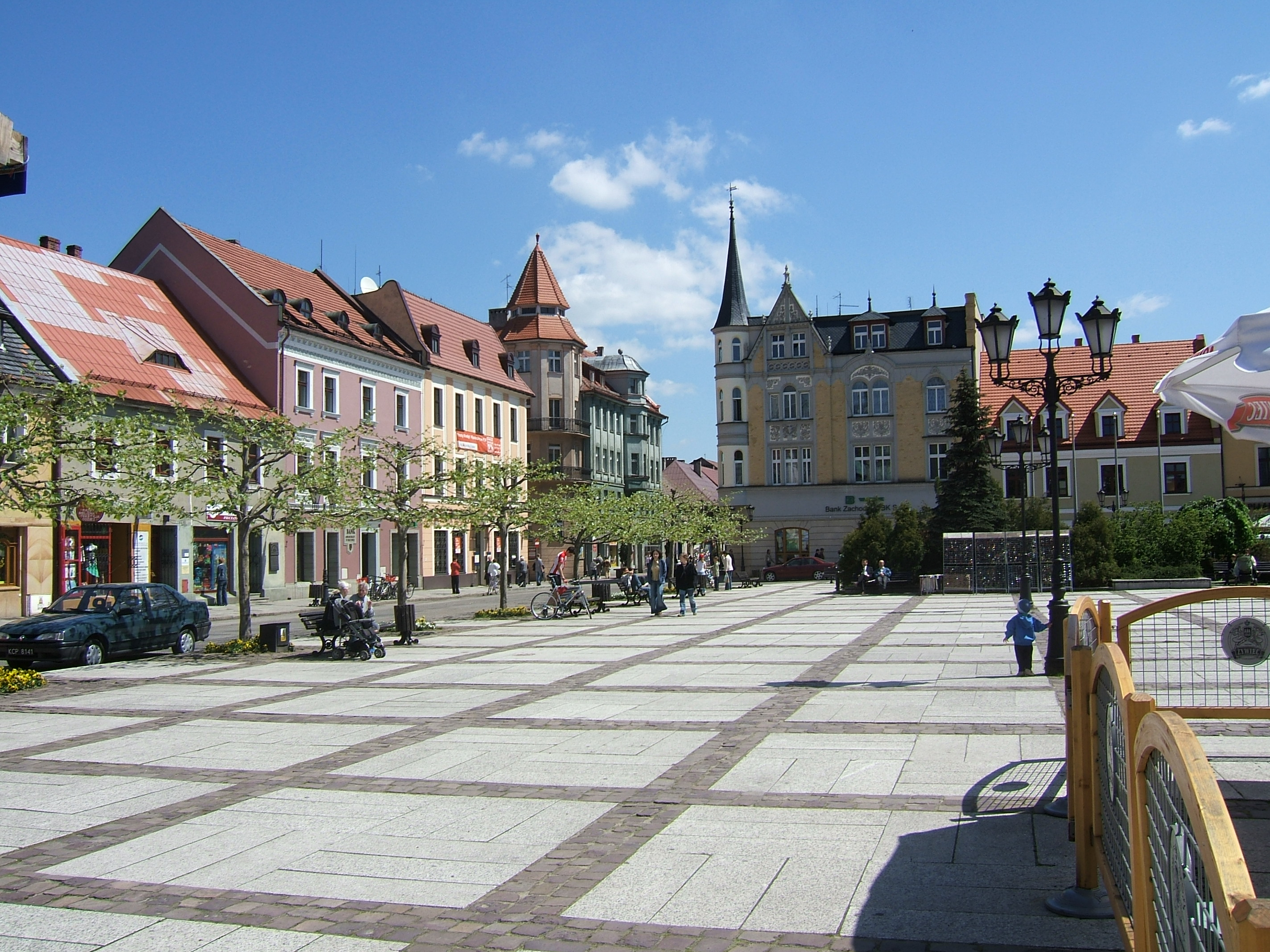 The market square (Rynek) in Pszczyna